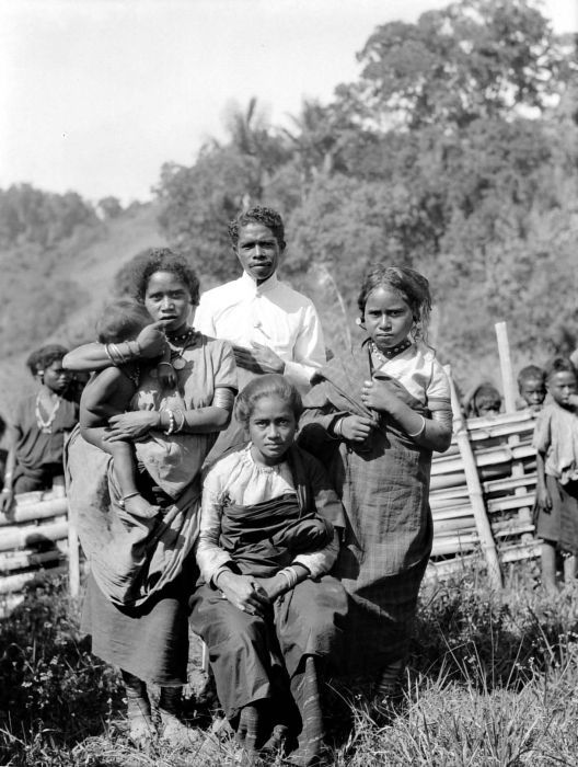 Negatief. Manggarai-familie van een schoolonderwijzer van een desa